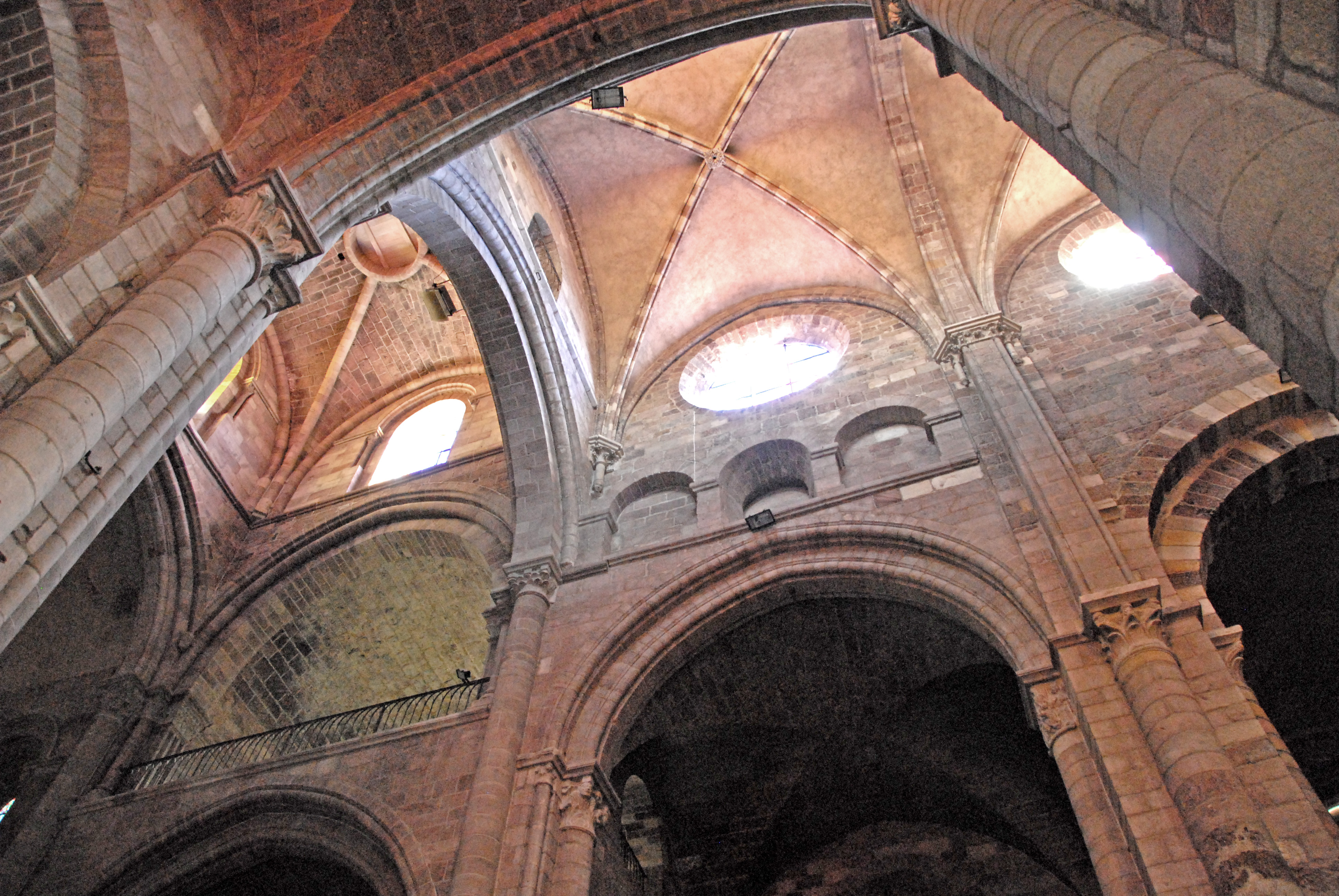 St.-Julien, SO-Wand Mittelschiff, Joche 4-5 + Vierung